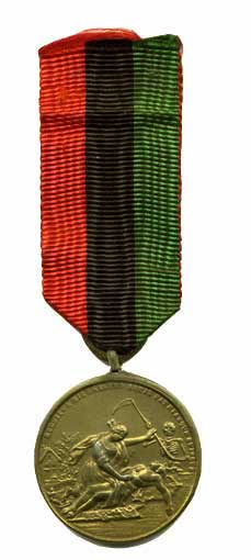 bronzen medaille van de KNBRD uitgereikt vanwege het redden van een drenkeling